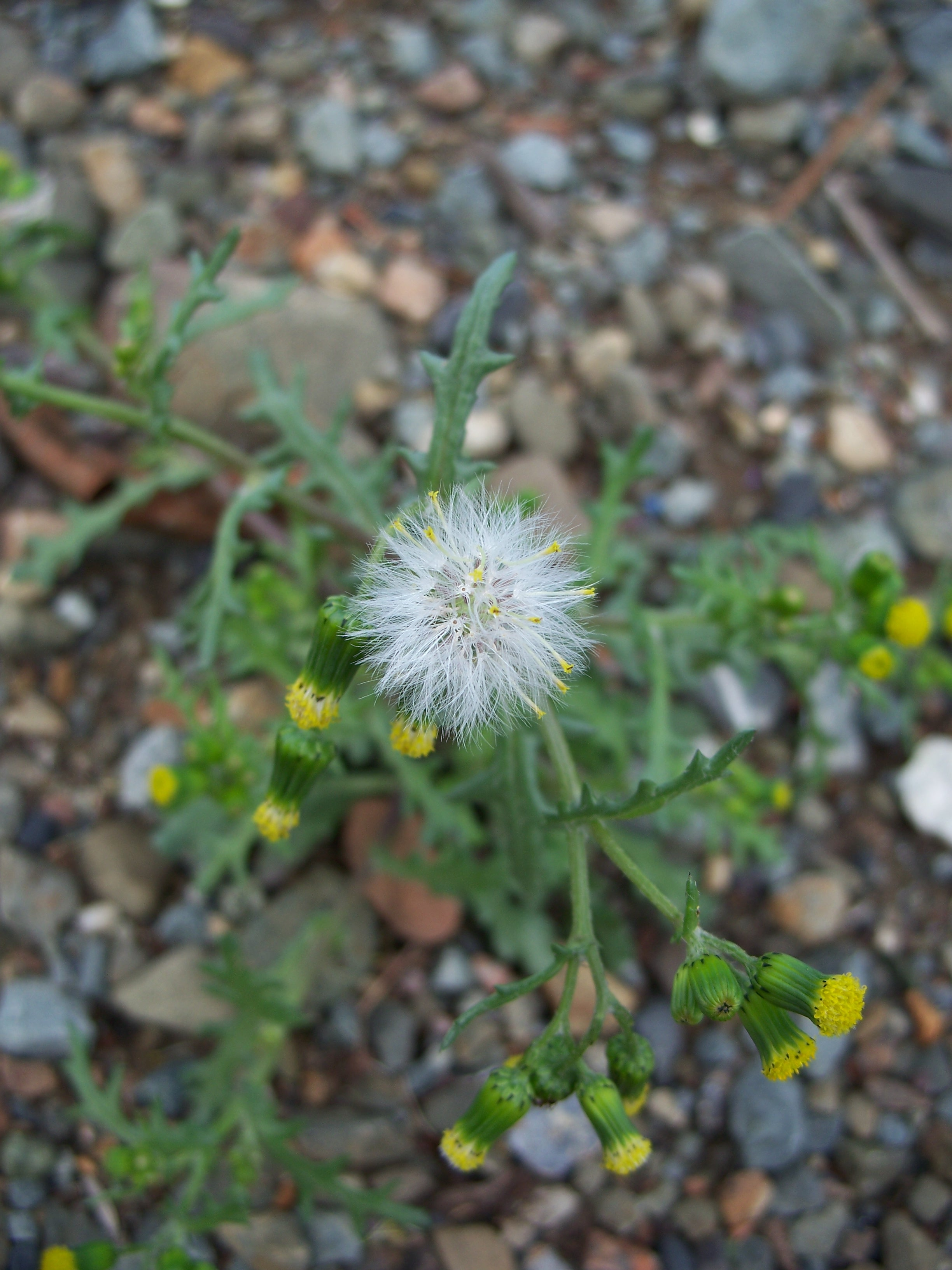 Senecio vulgaris Made in San Jose, California on February 11, 2007. Identified by Rasbak.